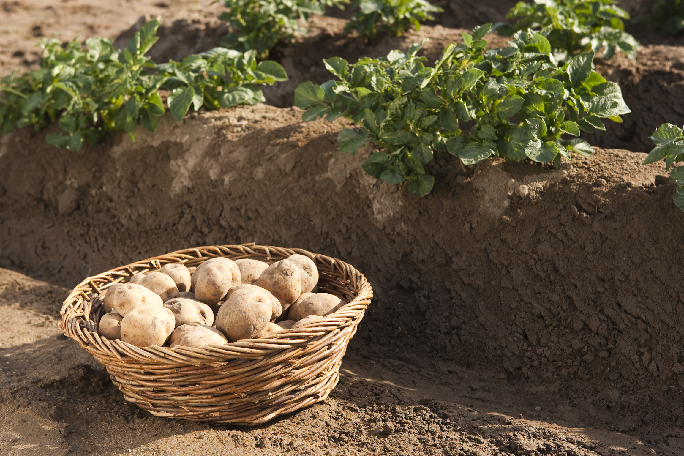 Amflora, die gentechnisch veränderte Stärkekartoffel der BASF, bildet reine Amylopektinstärke für technische Anwendungen. Herkömmliche Kartoffeln produzieren ein Stärkegemisch aus Amylopektin und Amylose. In vielen technischen Anwendungen der Papier-, Garn- oder Klebstoffindustrie ist reines Amylopektin vorteilhaft, weil es nicht geliert.